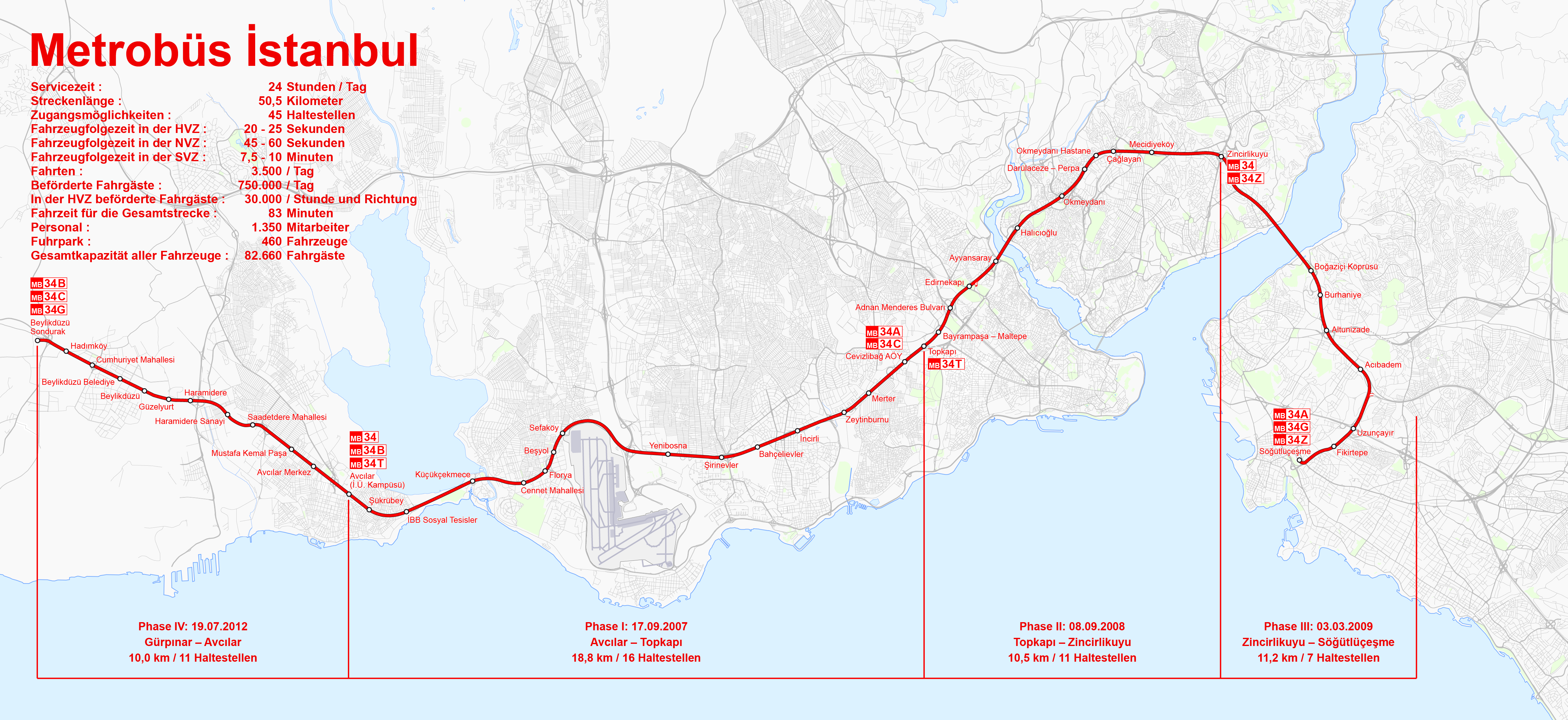 Metrobüs Istanbul map